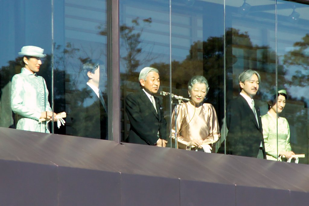 Famille Impériale du Japon lors du 72ème anniversaire de l'Empereur le 23 Décembre 2005 au Kokyo Kyuden de Tokyo. De gauche à droite : * Son Altesse Royale, la Princesse Masako * Son Altesse Royale, le Prince Naruhito * Sa Majesté, l'Empereur Akihito * Sa Majesté, l'Impératrice Michiko * Son Altesse Royale, le Prince Akishino (Fumihito) * Son Altesse Royale, la Princesse Akishino (Kiko)